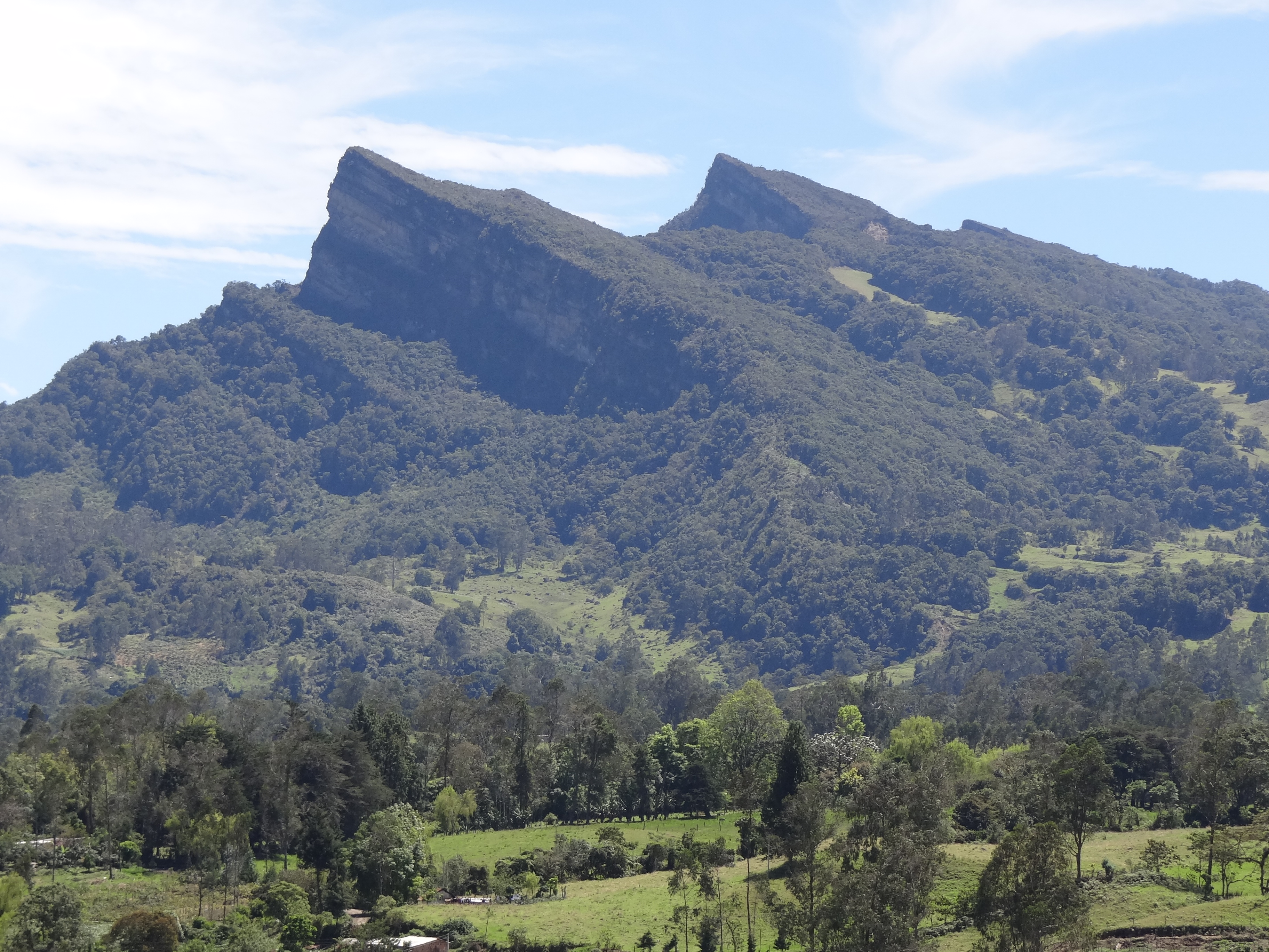 Pico Yanacá, en en jurisdicción del municipio de Maripí, departamento de Boyacá, Colombia